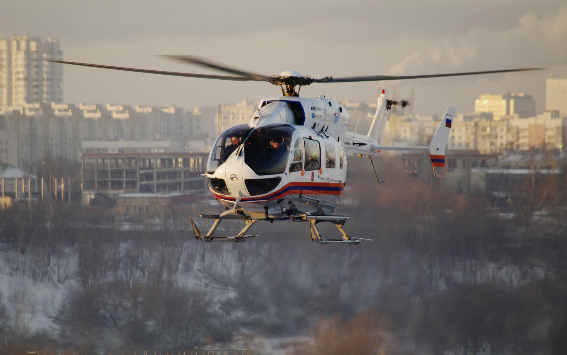 Eurocopter EC145 RA-01883 МЧС Москва